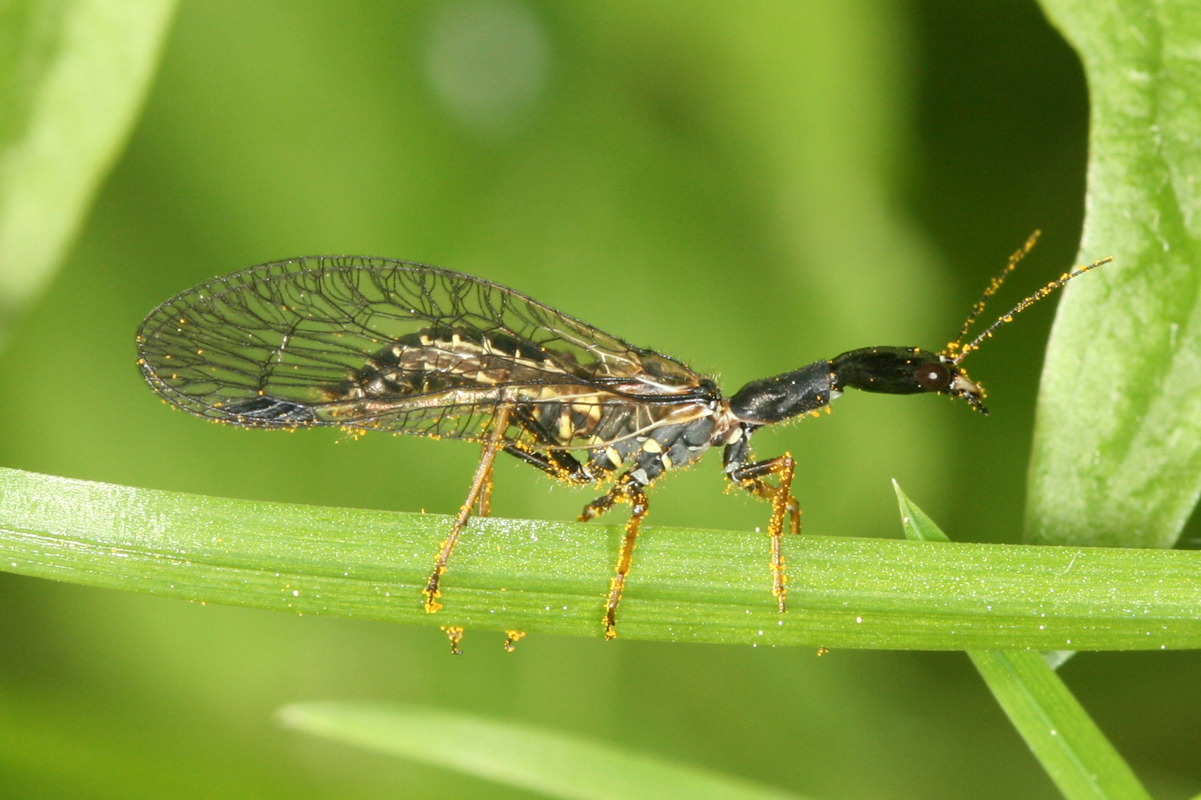 Phaeostigma notata. Trouvée parmi des orties en bordure de milieu forestier.